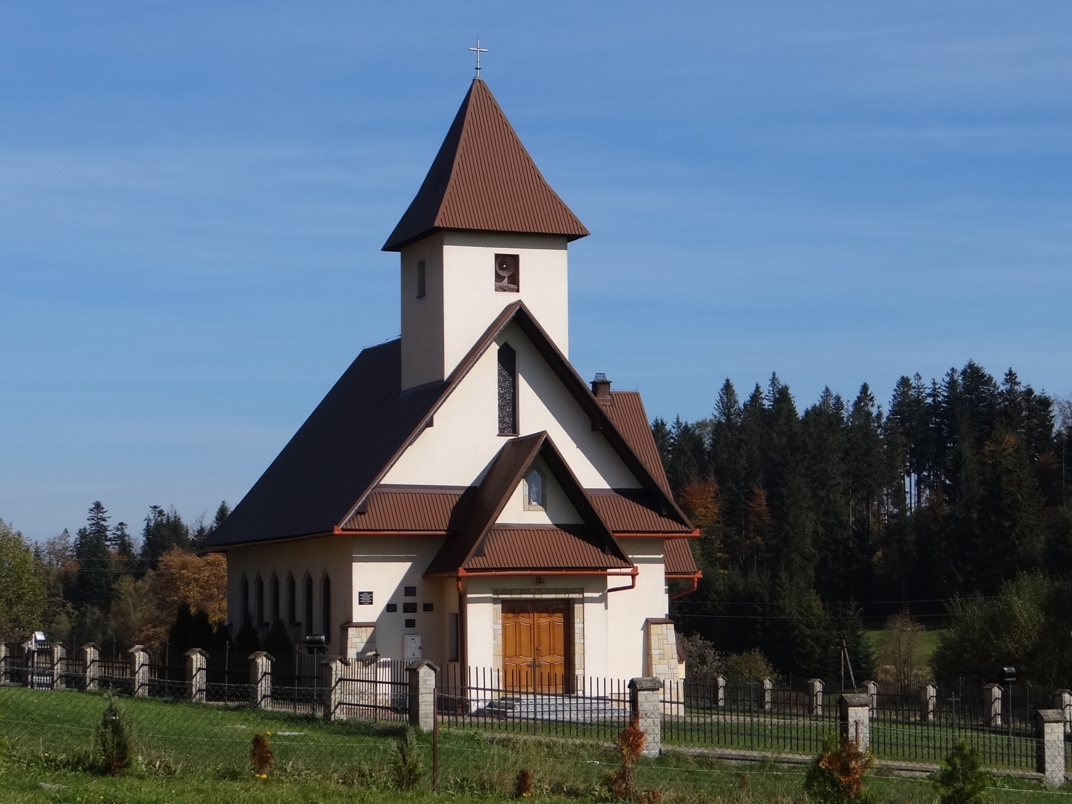 Kaplica w miejscowości Bukowina-Osiedle